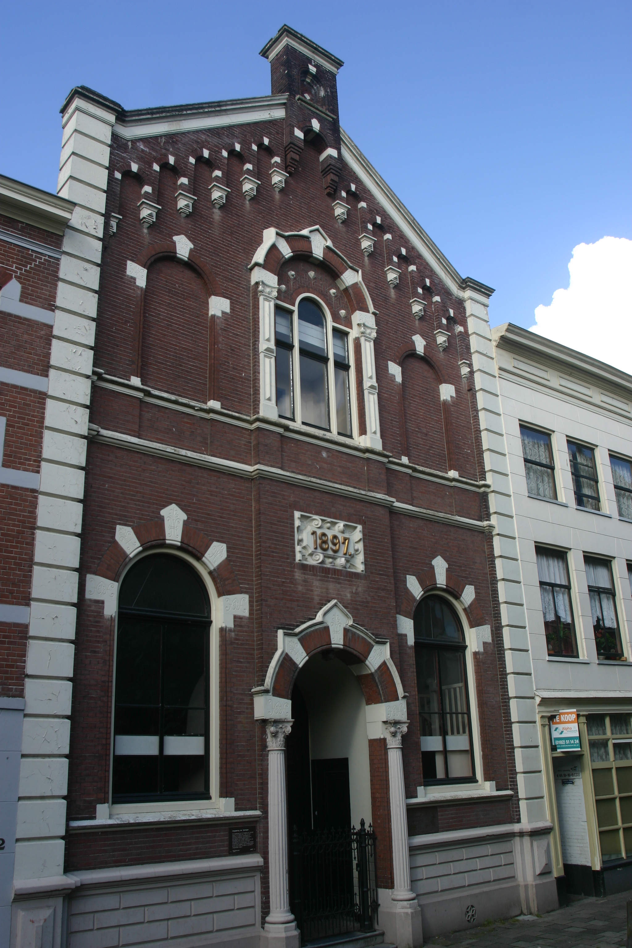 KERKGEBOUW uit 1897, bestemd als vergaderlokaal voor de 'Vergadering van Gelovigen', in Eclectische stijl. In opdracht van de Goudse koopman in manufacturen Pieter de Raadt gebouwd. In 2015 heeft het gebouw een andere bestemming gekregen